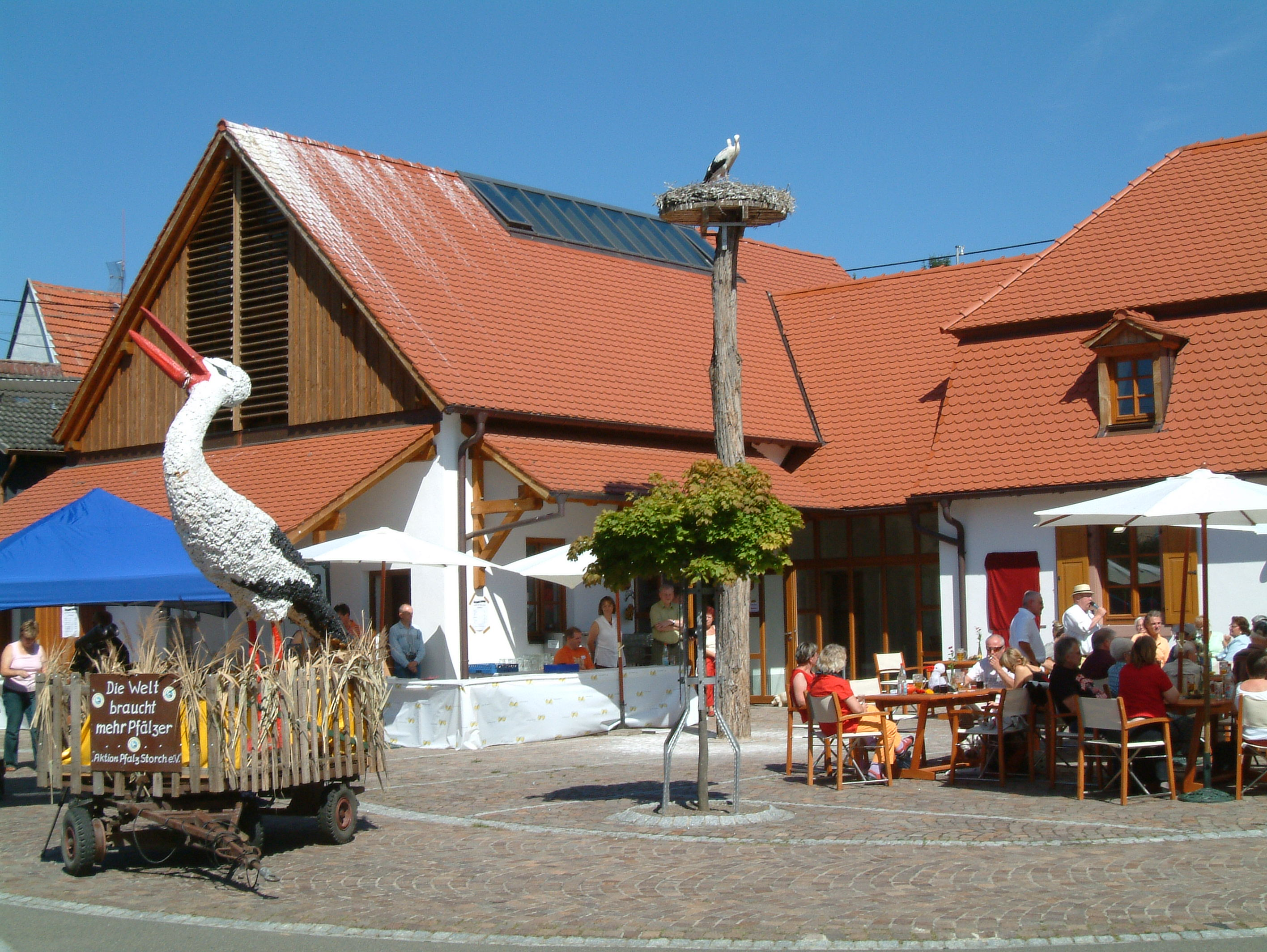 "Storchenzentrum" in Bornheim (Pfalz), ein Gemeinschaftsprojekt der Gemeinde Bornheim und der Aktion Pfalzstorch